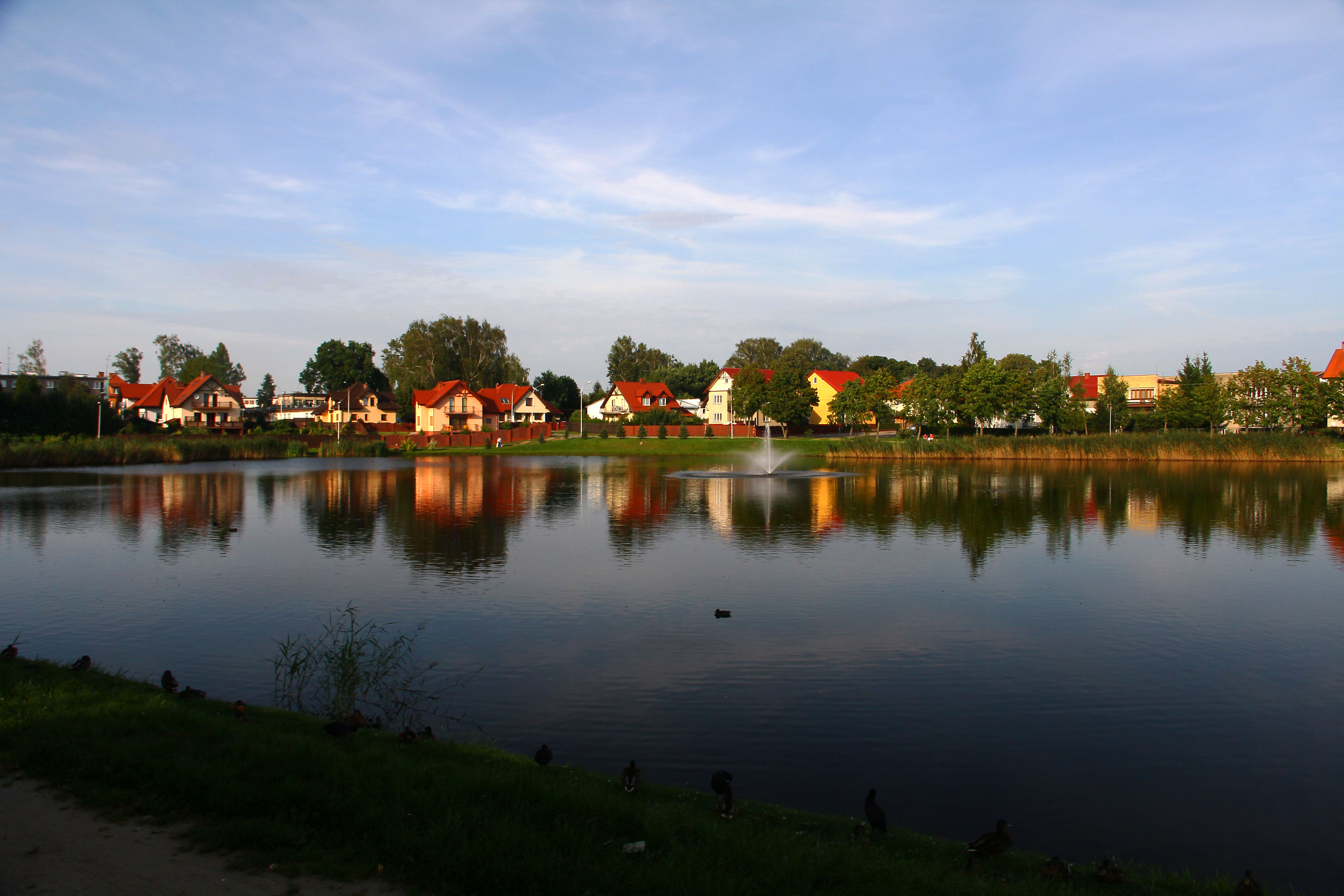 Jeziorko Barbetowskie w Bartoszycach.